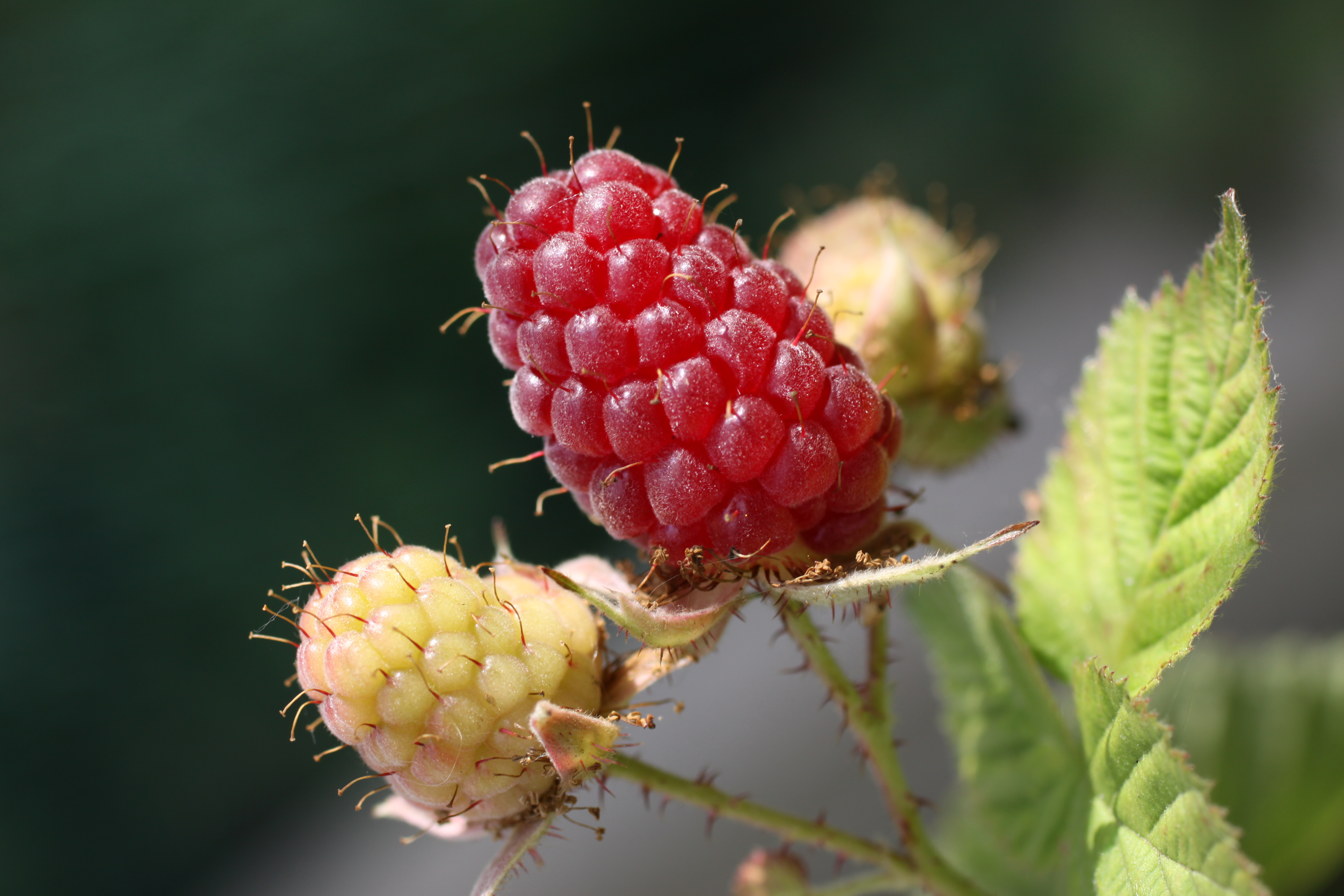 Deux framboises en train de murir. Cette photographie a été prise dans un jardin à La Rochelle (France).